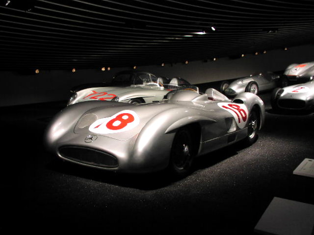 1955 Mercedes-Benz "Silberpfeil" streamline racing car